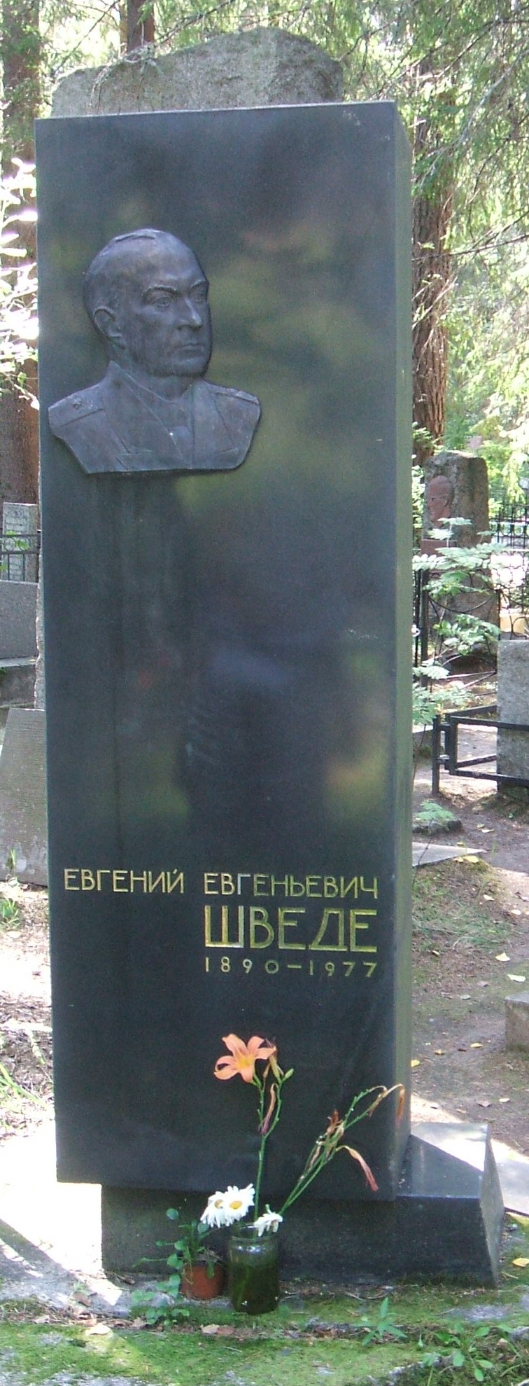 Комаровское кладбище Деятели культуры и науки